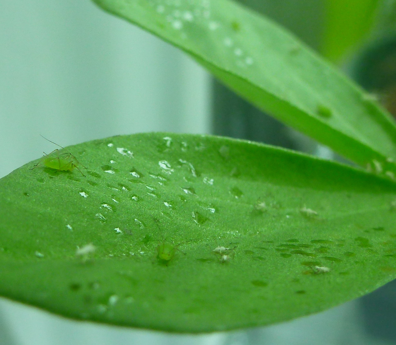 Pucerons (Acyrthosiphon pisum) et dépots de miellat sur feuille de Vicia fabae.